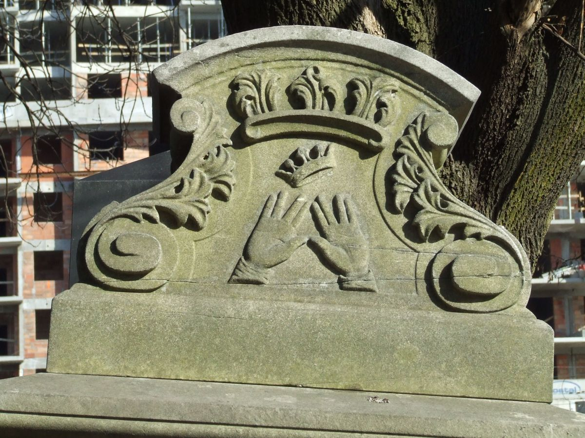 Symbolika